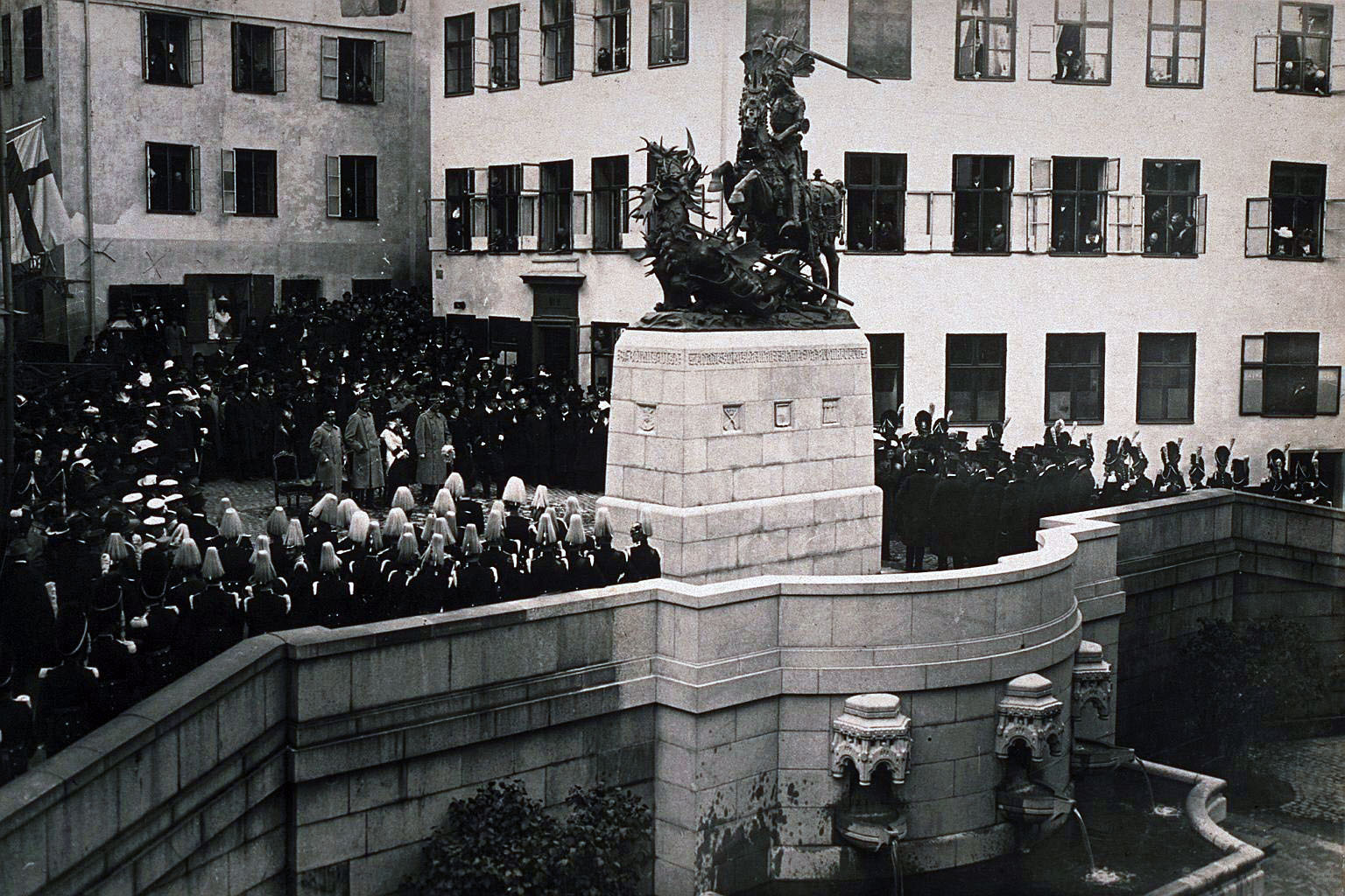 Invigning av Sankt Göran och Draken vid Köpmantorget 10 oktober 1912